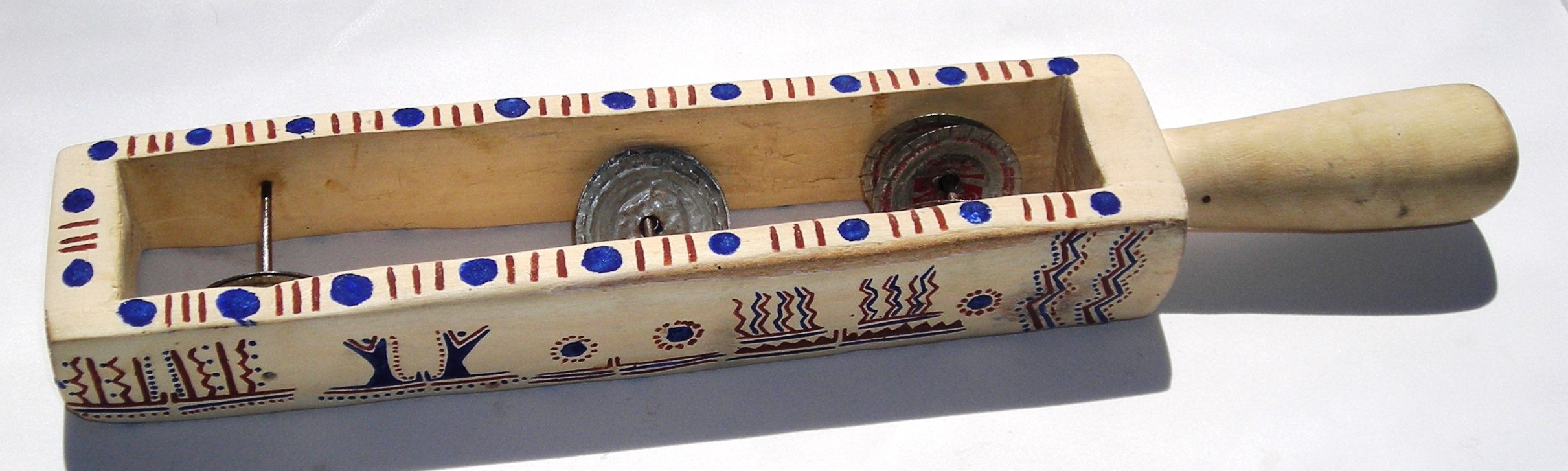 Seri rattle (sonaja) (ziix haqueenla)